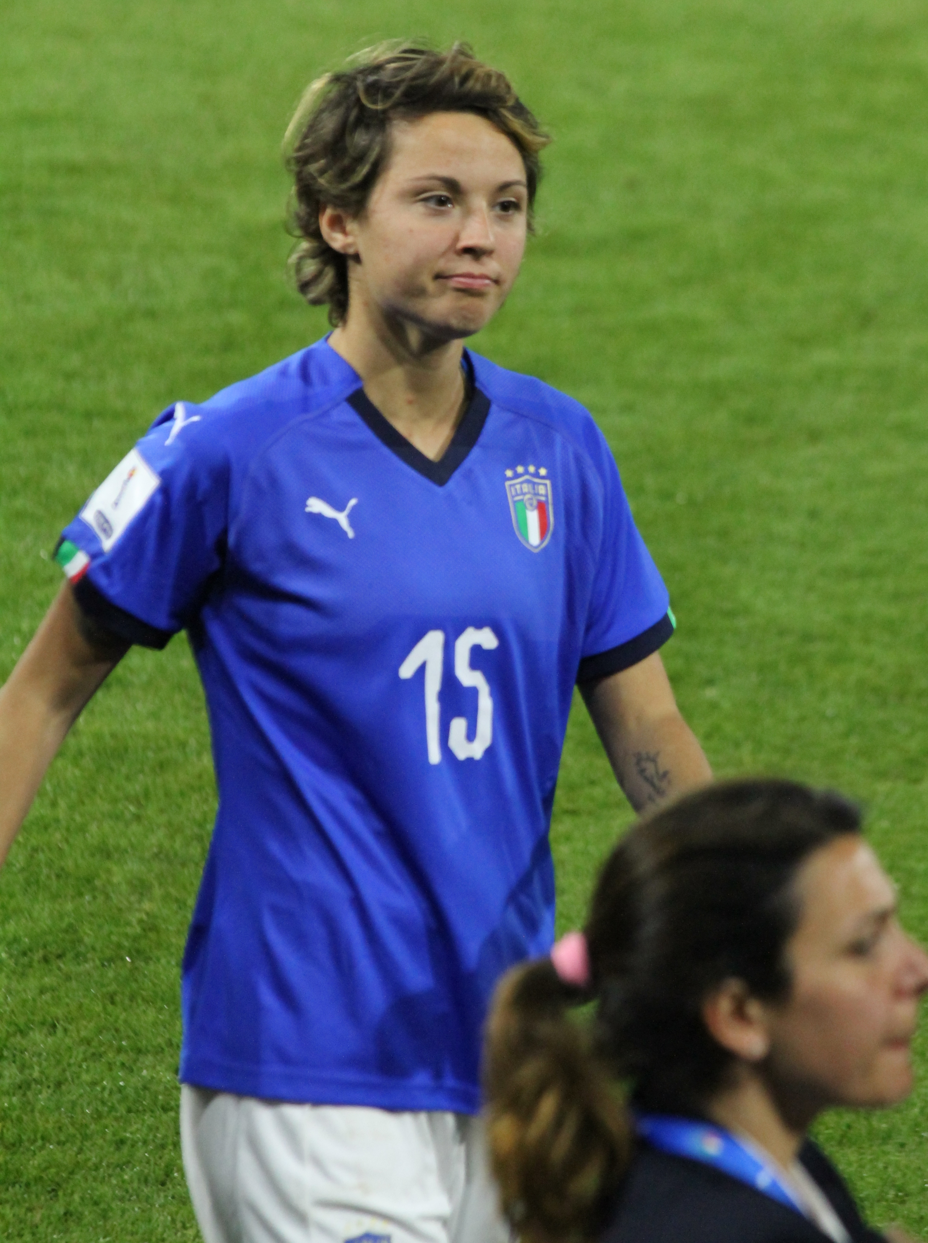 Valentina Giacinti, nazionale di calcio femminile dell'Italia, a fine incontro Italia-Belgio del 10 aprile 2018 allo stadio Mazza di Ferrara.